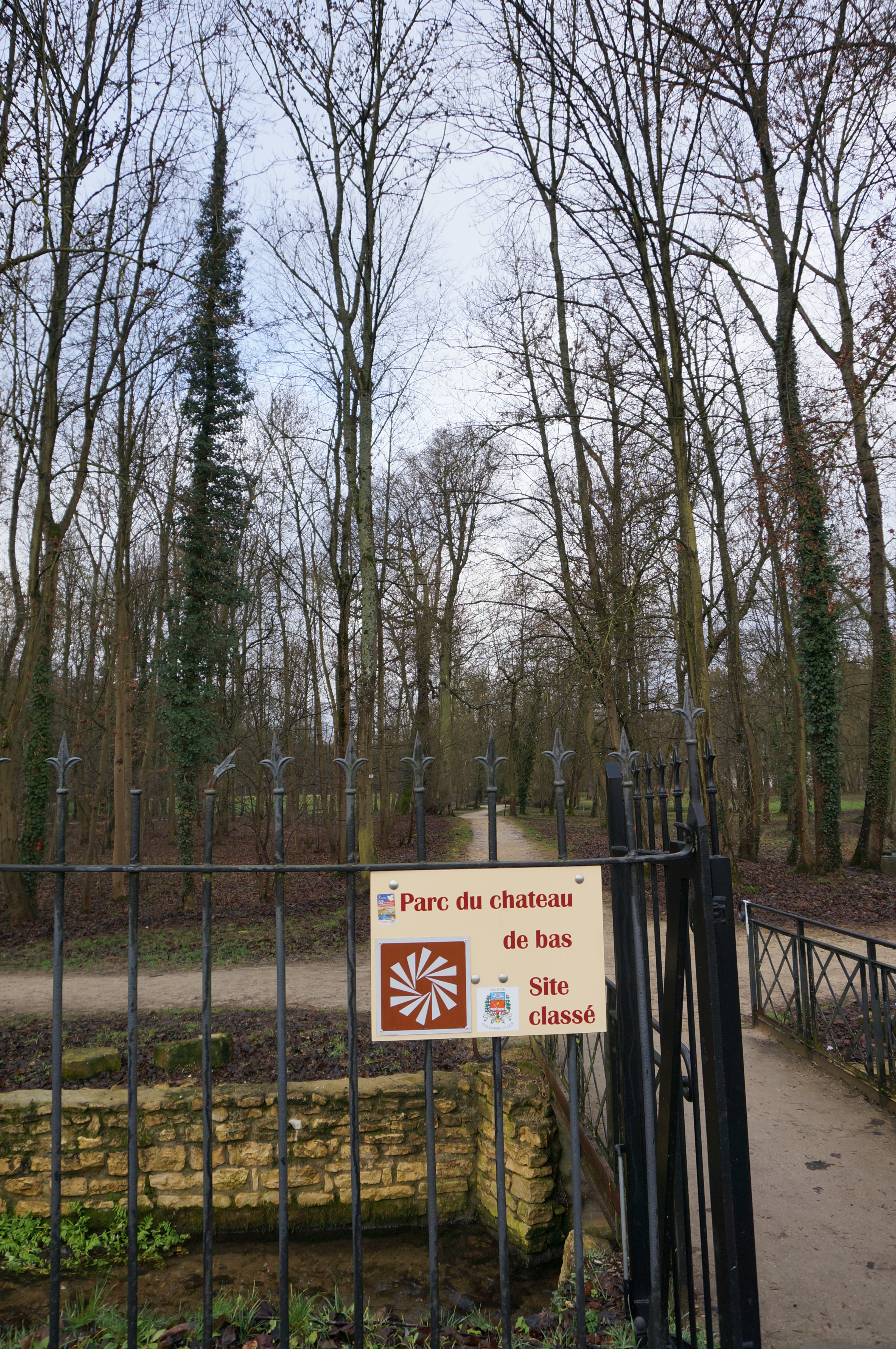 VUe du parc du Château du bas, entrée avec pont sur la Bellefontaine .